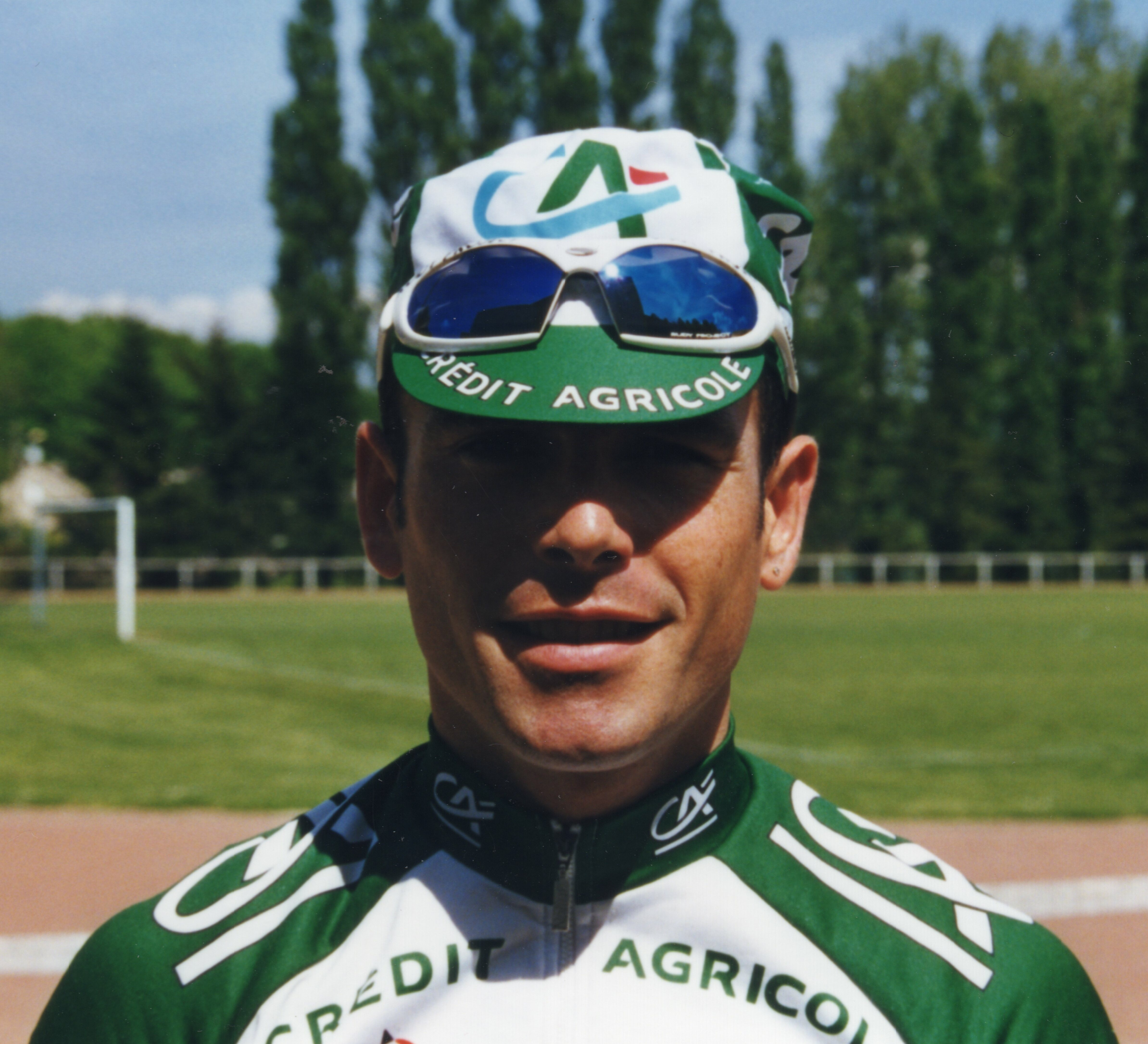 Olivier Perraudeau lors du Critérium de Lèves 1999